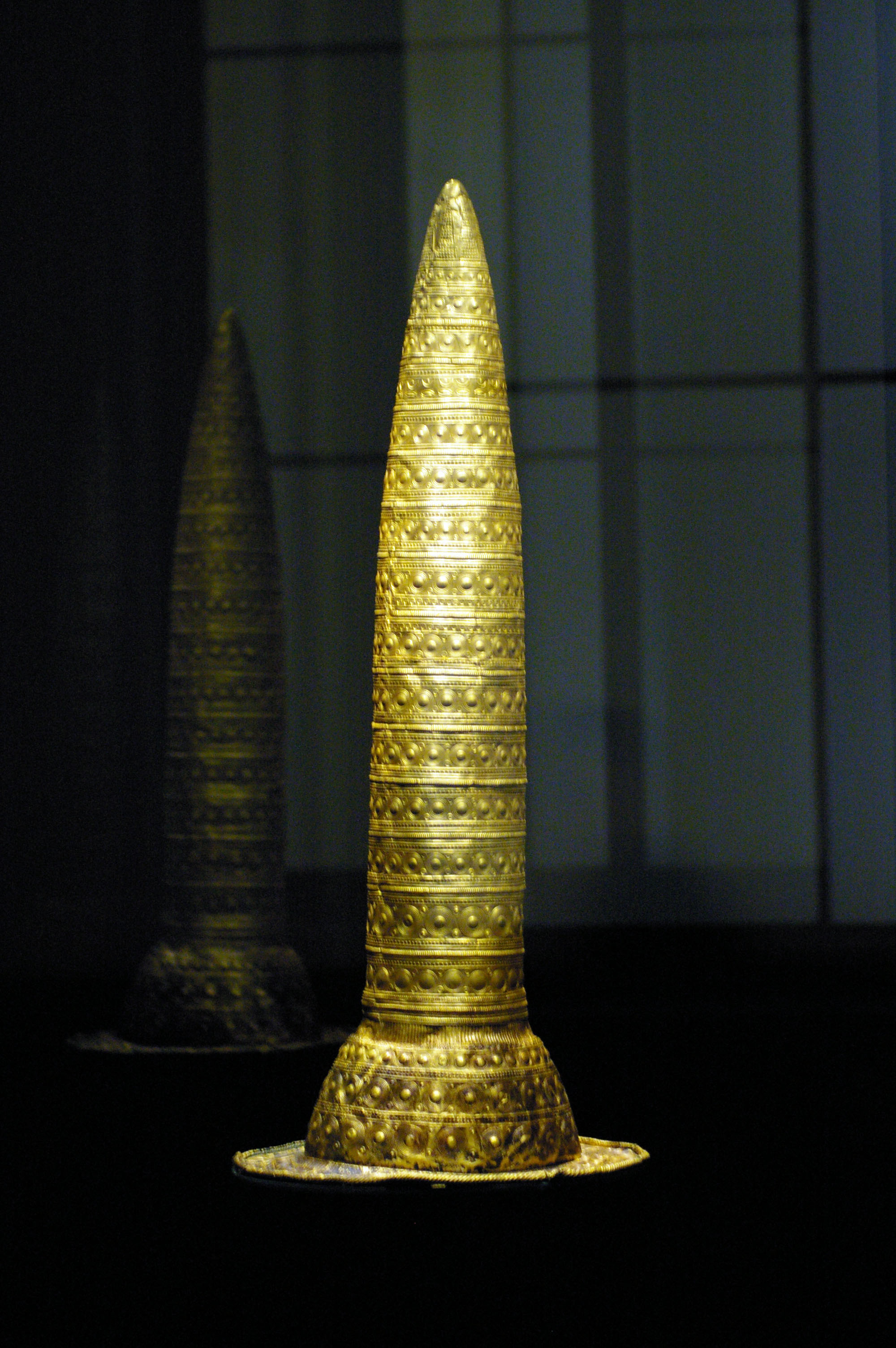 Zlatý klobouk v Neues Museu